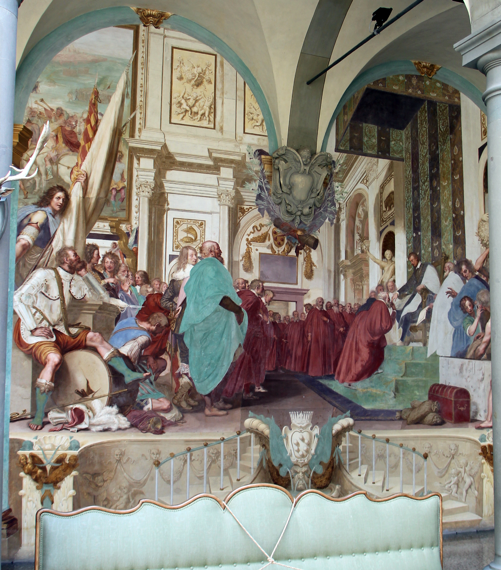 Villa medicea della Petraia - MIBAC The making of this document was supported by Wikimedia CH. (Submit your project!) For all the files concerned, please see the category Supported by Wikimedia CH. This is a photo of a monument which is part of cultural heritage of Italy.